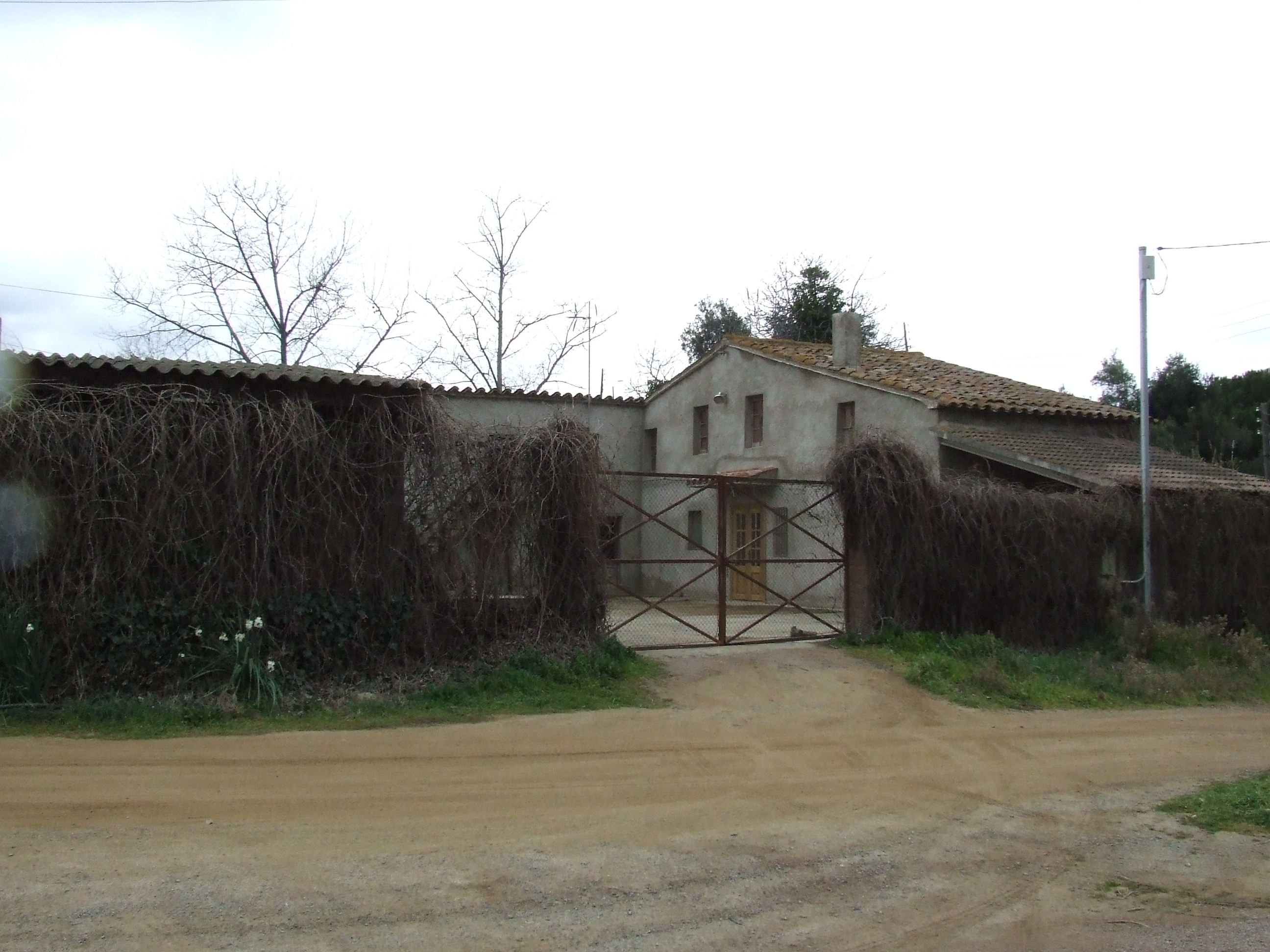 Can Margarins del Pla (Bigues, Bigues i Riells, Vallès Oriental)